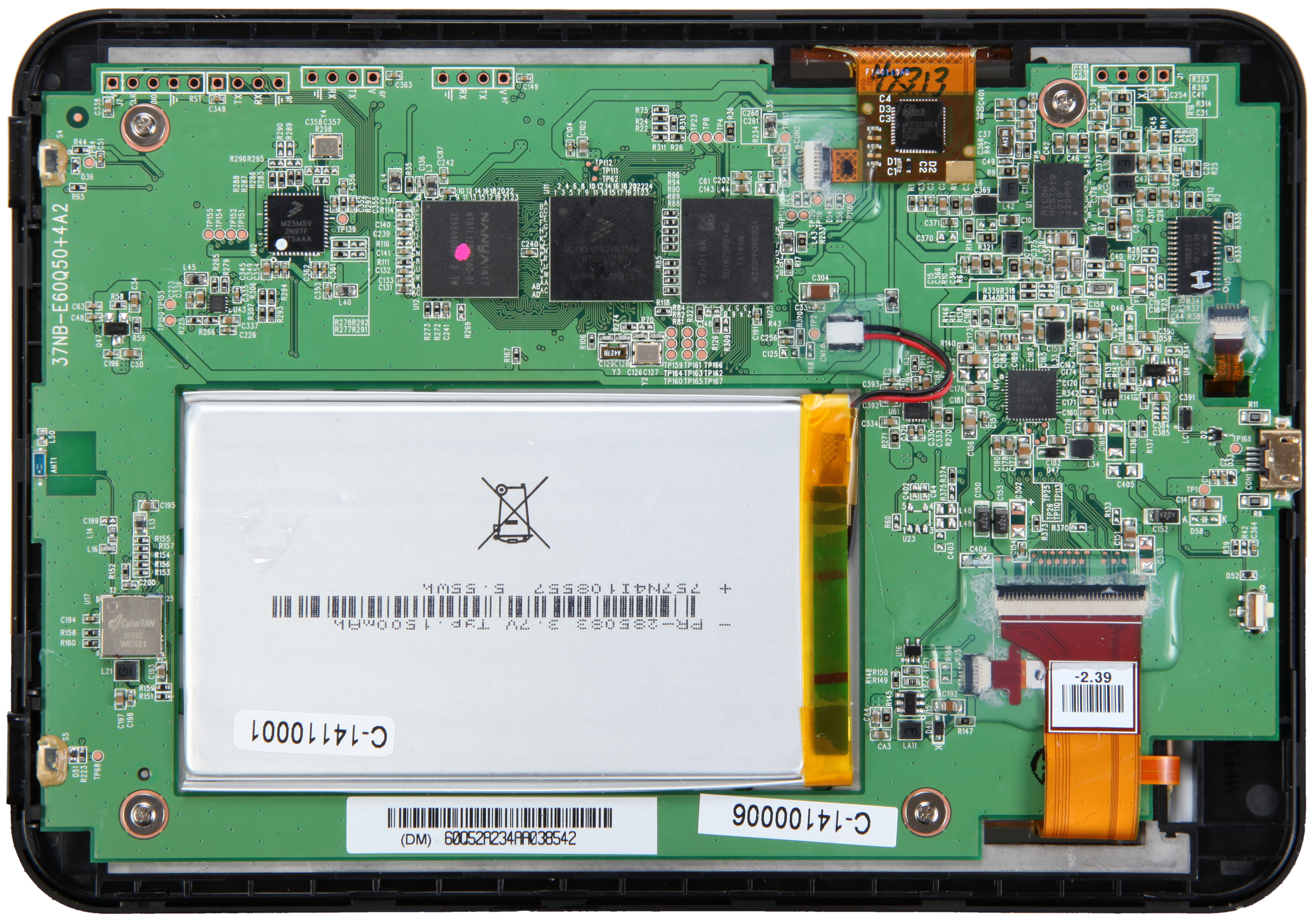 Geöffneter Tolino Viosion 2